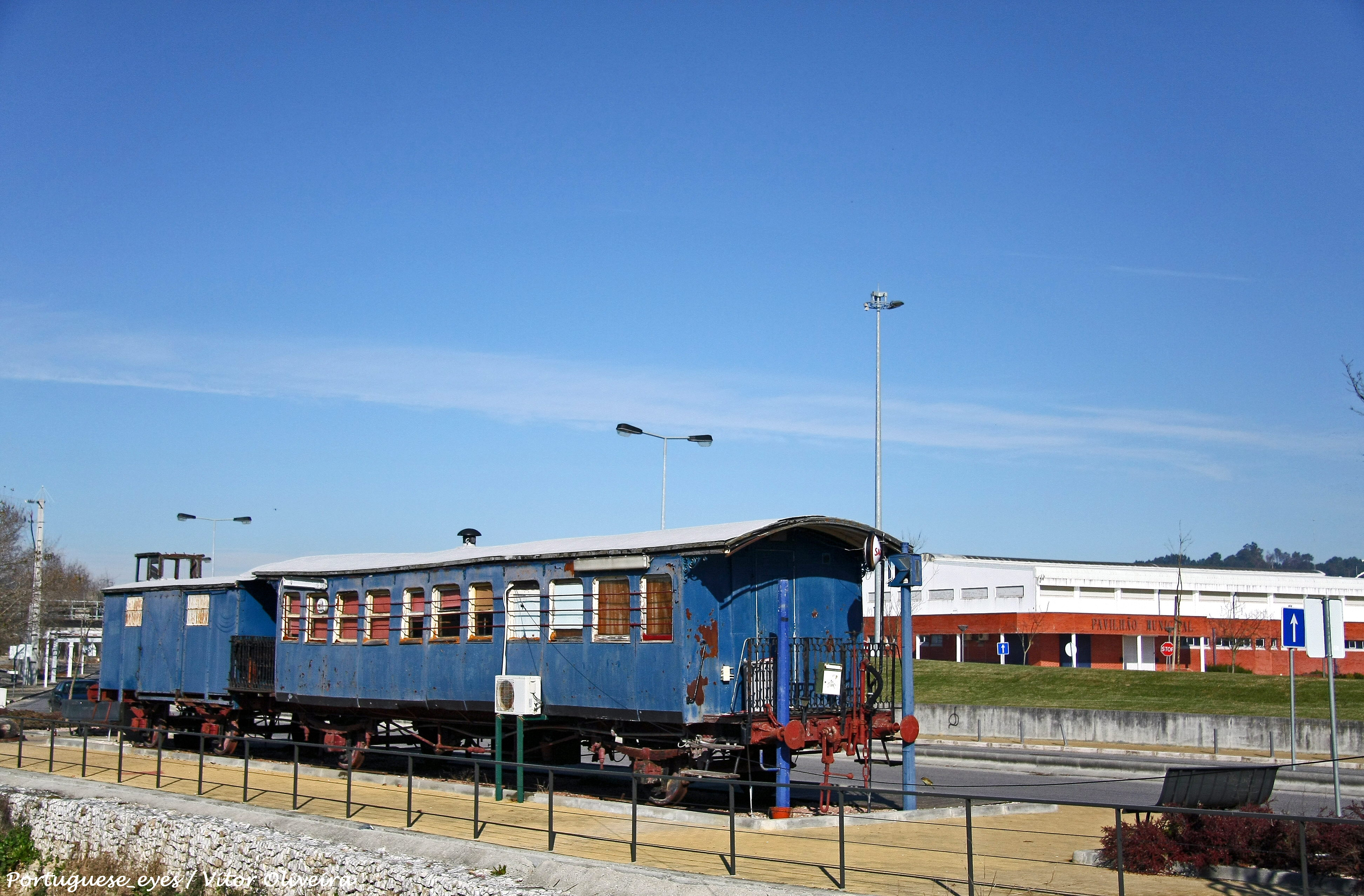 Azambuja - Portugal